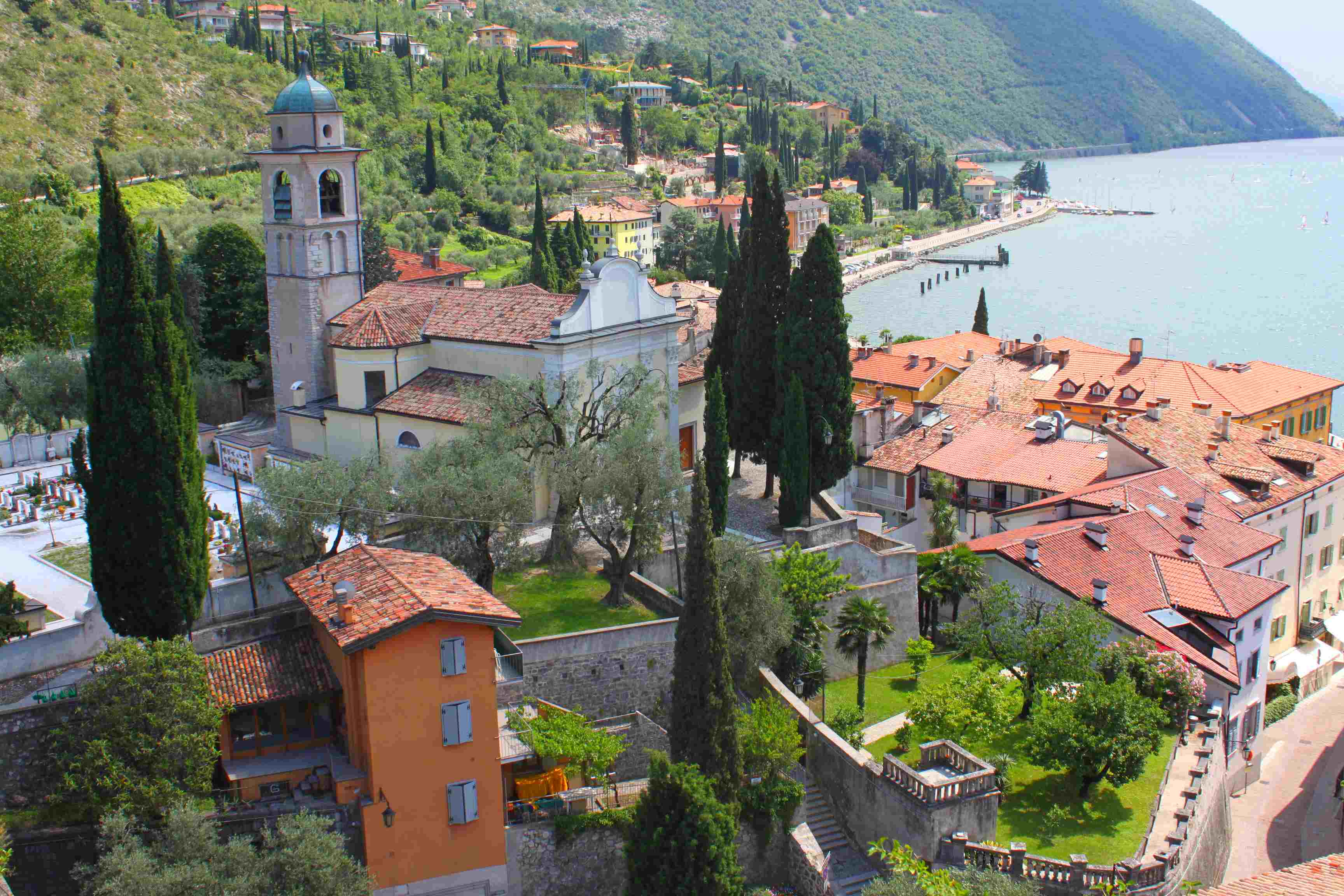 Die Chiesa parrocciale di Sant´Andrea wird 1175 erstmals erwähnt und während des Barocks mit einem Kirchenschiff und zwei Seitenkapellen neu aufgebaut